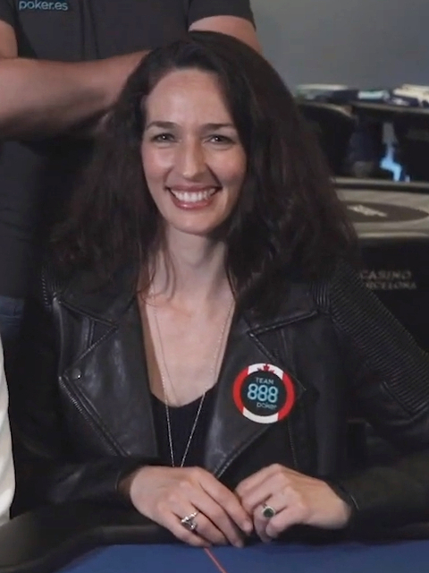 Kara Scott als Teil des Team 888poker